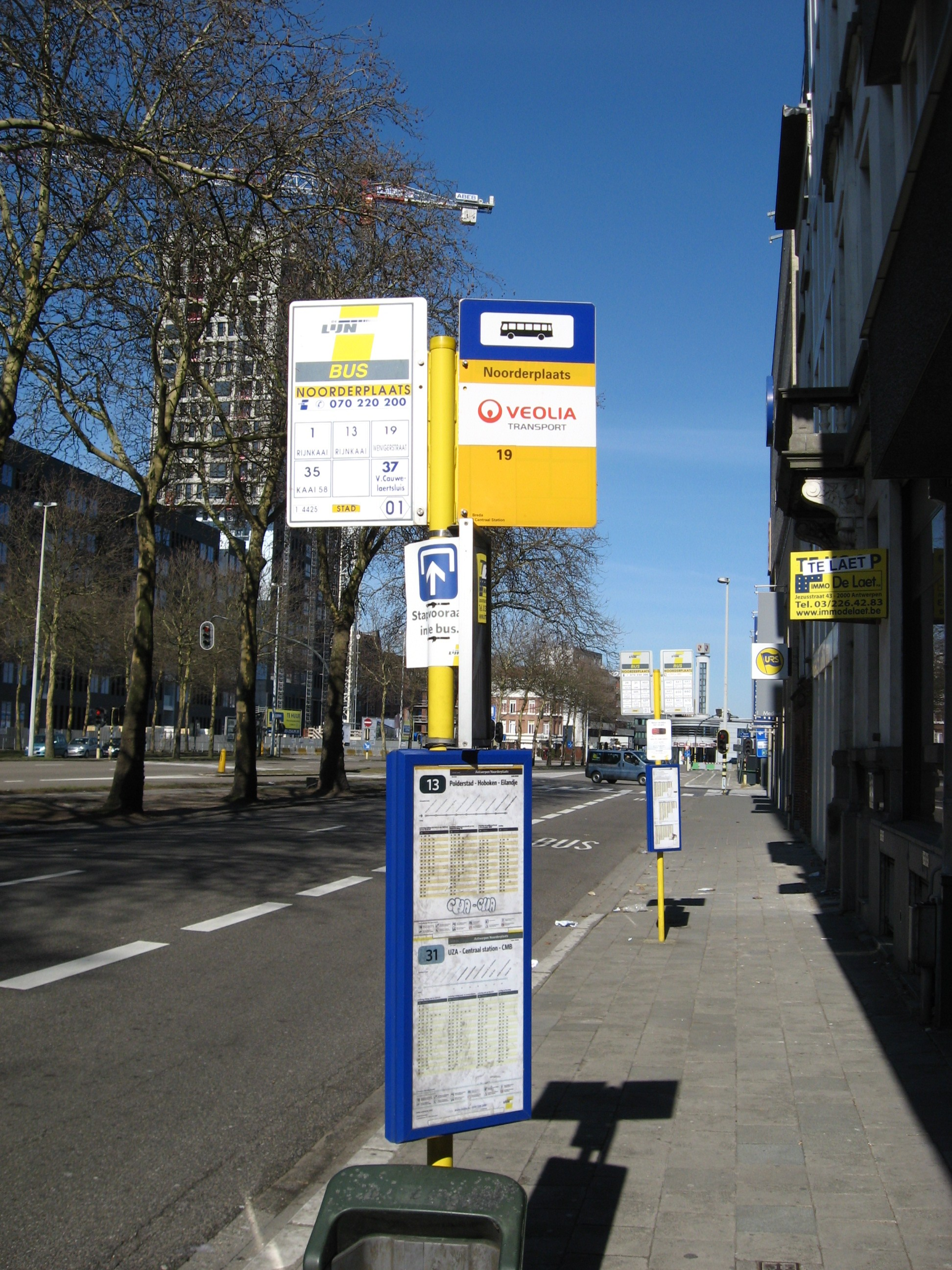 Naast een de "De Lijn" busstop is deze ook een stop voor de Nederlandse Veolia buslijn Breda Hulst, die twee stops in Antwerpen heeft. Er is enkel Nederlands binnenlands vervoer met Nederlandse streekvervoer tarieven. Internationale reizigers moeten een special vervoersbewijs kopen.